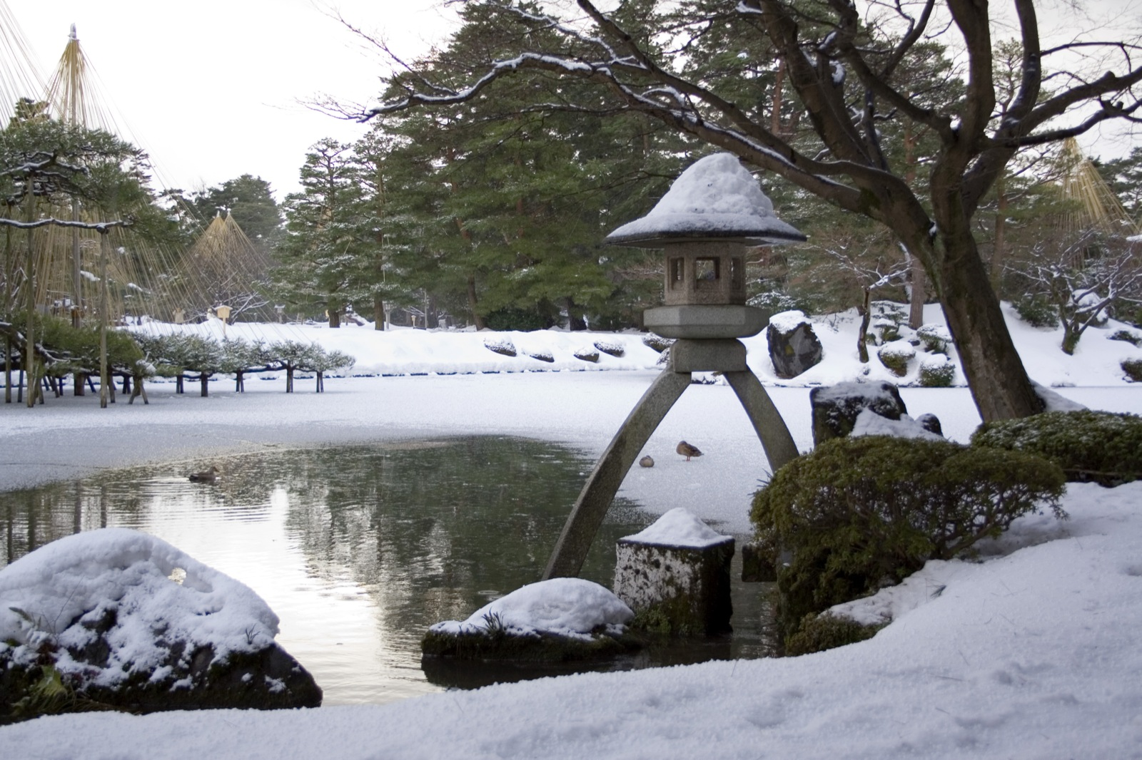 Kenroku-en (Six Attributes Garden), located in Kanazawa, Ishikawa, Japan (兼六園の動画)